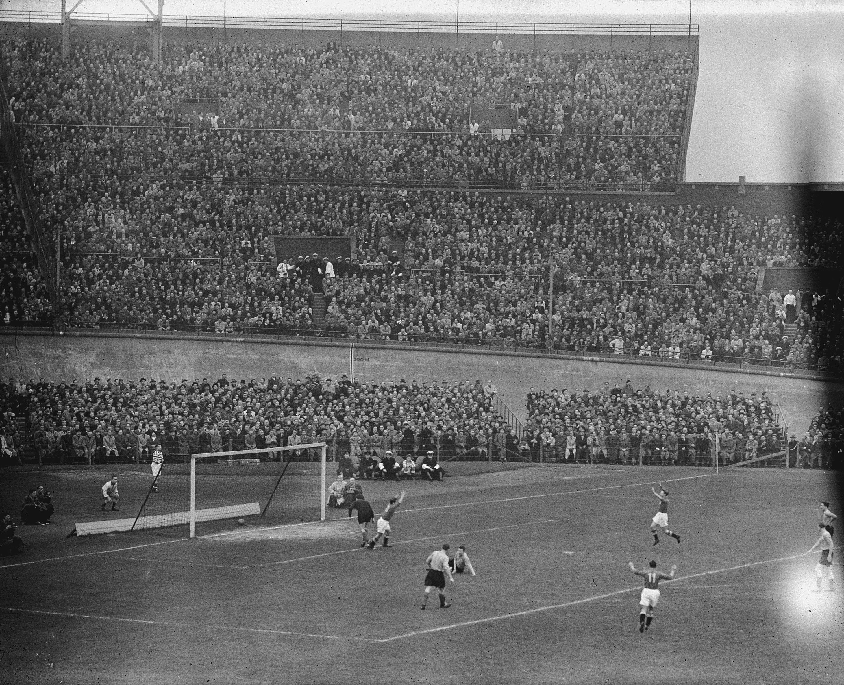 Collectie / Archief : Fotocollectie Anefo Reportage / Serie : [ onbekend ] Beschrijving : Voetbal. Nederland tegen Zwitserland. Zwitsers doelpunt Datum : 18 maart 1953 Trefwoorden : sport, voetbal Fotograaf : Noske, J.D. / Anefo Auteursrechthebbende : Nationaal Archief Materiaalsoort : Glasnegatief Nummer archiefinventaris : bekijk toegang 2.24.01.09 Bestanddeelnummer : 905-6233